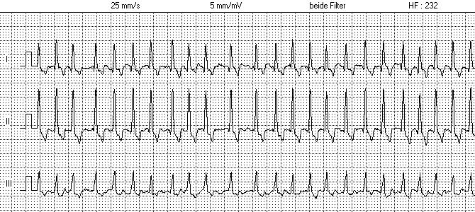 Supraventrikuläre Tachykardie beim Hund, ausgelöst durch Vorhofflimmern infolge einer DCM. Die Herzfrequenz liegt bei über 200 Schlägen pro Minute.